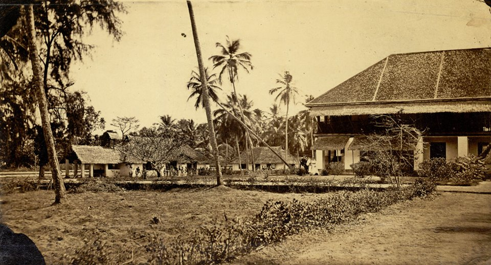 തിരുവിതാംകൂർ രാജ്യത്തിന്റെ ഭാഗമായിരുന്ന മാവേലിക്കരയിലെ ഒരു വിദ്യാലയം